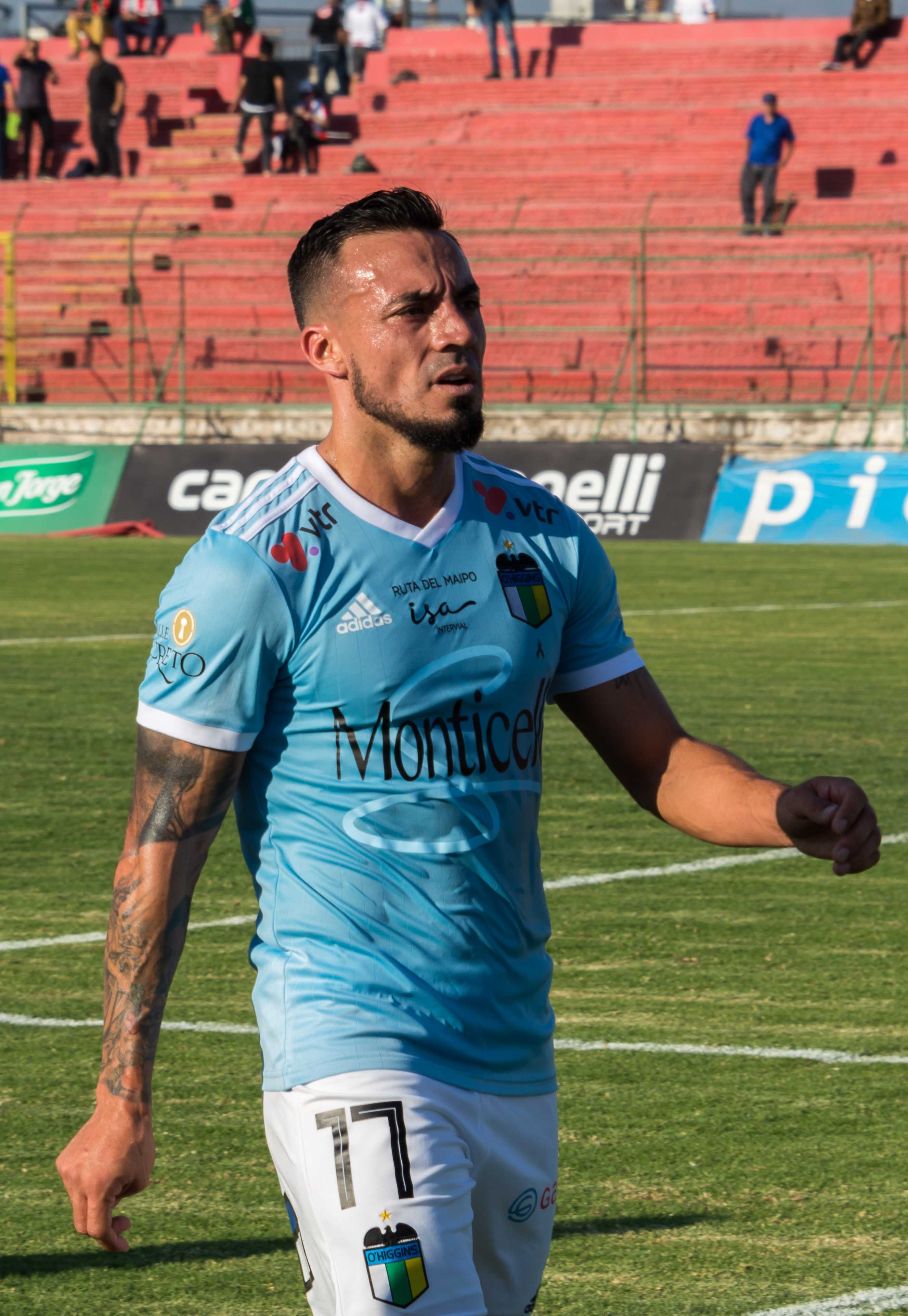 Roberto Cereceda, Palestino v O'Higgins, Estadio Municipal de La Cisterna, La Cisterna, Santiago, Chile.